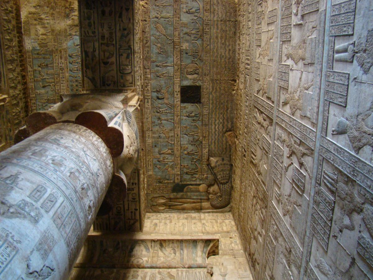 Храм богини Хатар